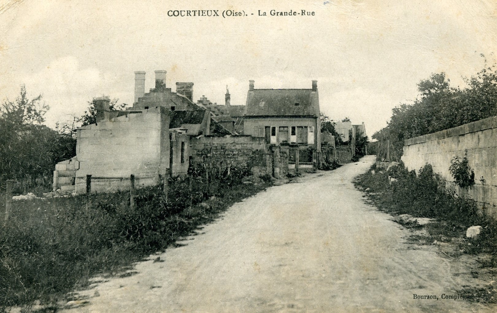 La Grand-rue vers 1910.